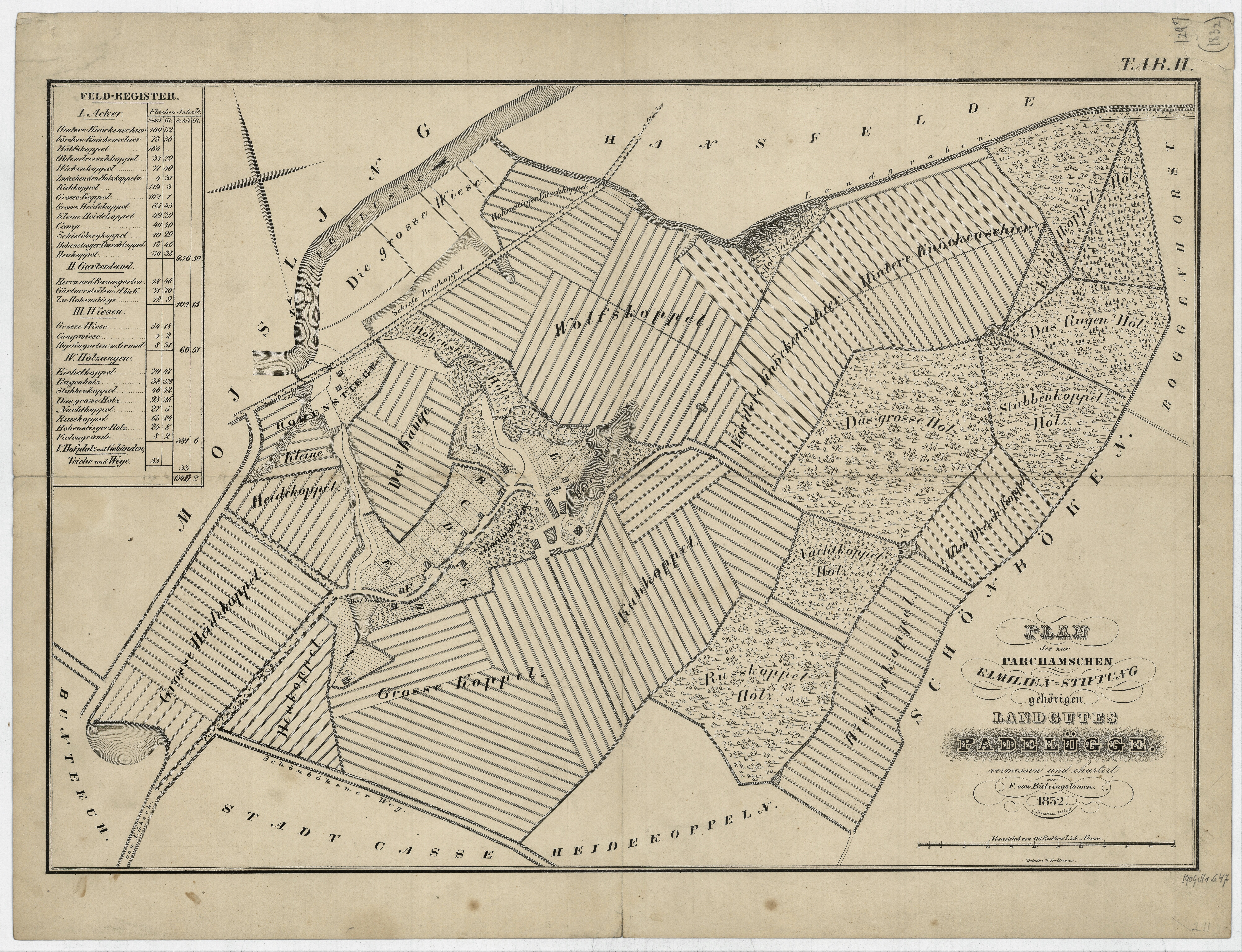 Titel: Plan des zur Parchamschen Familien-Stiftung Gehörigen Landgutes Padelügge Ophav: Bülzingslöwen, F. von Ressourcetype: Kort Genre: Topografi Størrelse: 1 kort 34 x 50 cm Udgivelsesland og sted: Tyskland Udgivelsessprog ger Udgivelsesdato: 1832 Emne Padelügge Lokalitet Lübeck Stadtkreis Id DK008133.tif Opstilling KBK Padelügge-0-1832/1, Hertugdømmerne, Holsten min. lok. Kommentar: Litografi Med Feld-register Betegnet: Tab. II vermessen und chartirt von F. von Bülzingslöwen 1832 J. Josephson lithogr. Steindr. v. H. Erdtmann